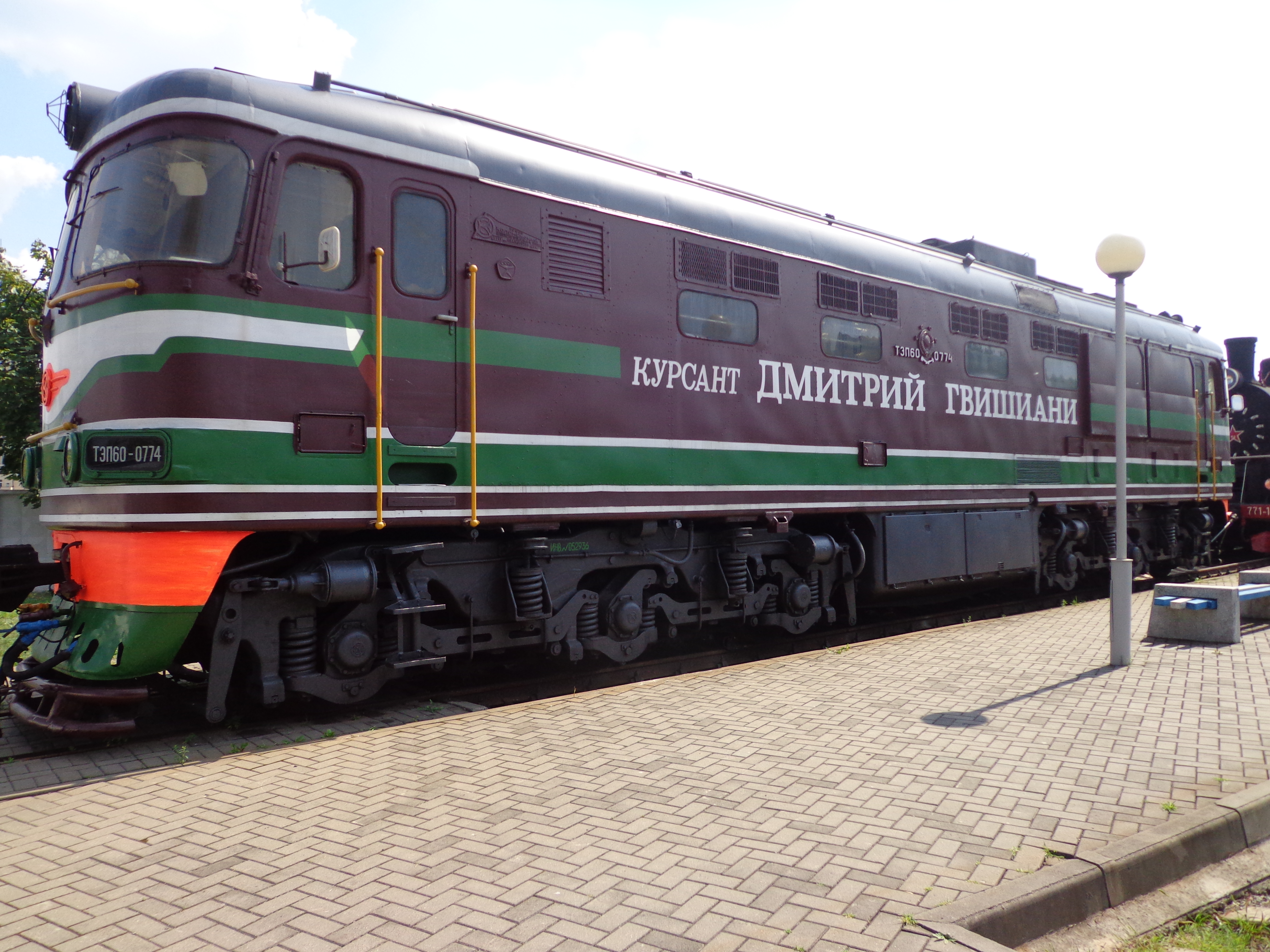 тепловоз тэп60-0774 им. курсант Дмитрий Гвишиани в экспозиции Брестского железнодорожного музея